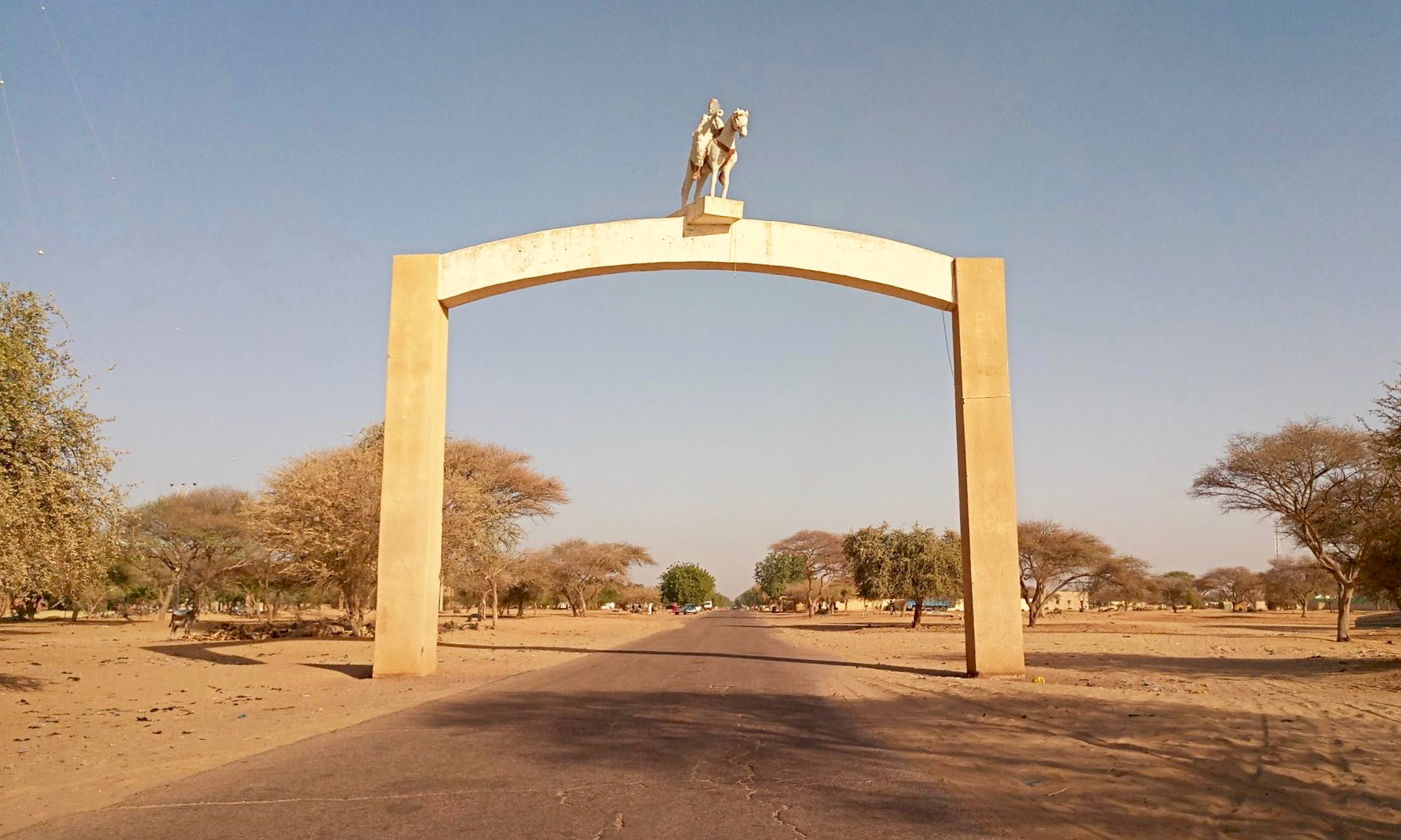 Porte Diffa Yerima, westliche Stadteinfahrt von Diffa, Niger